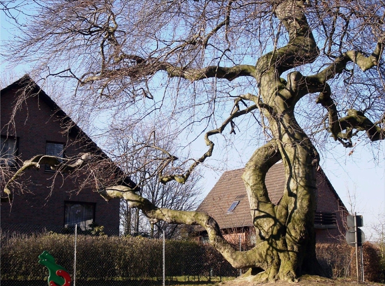 Die über 150 Jahre alte Süntelbuche in Haste bei Bad Nenndorf.